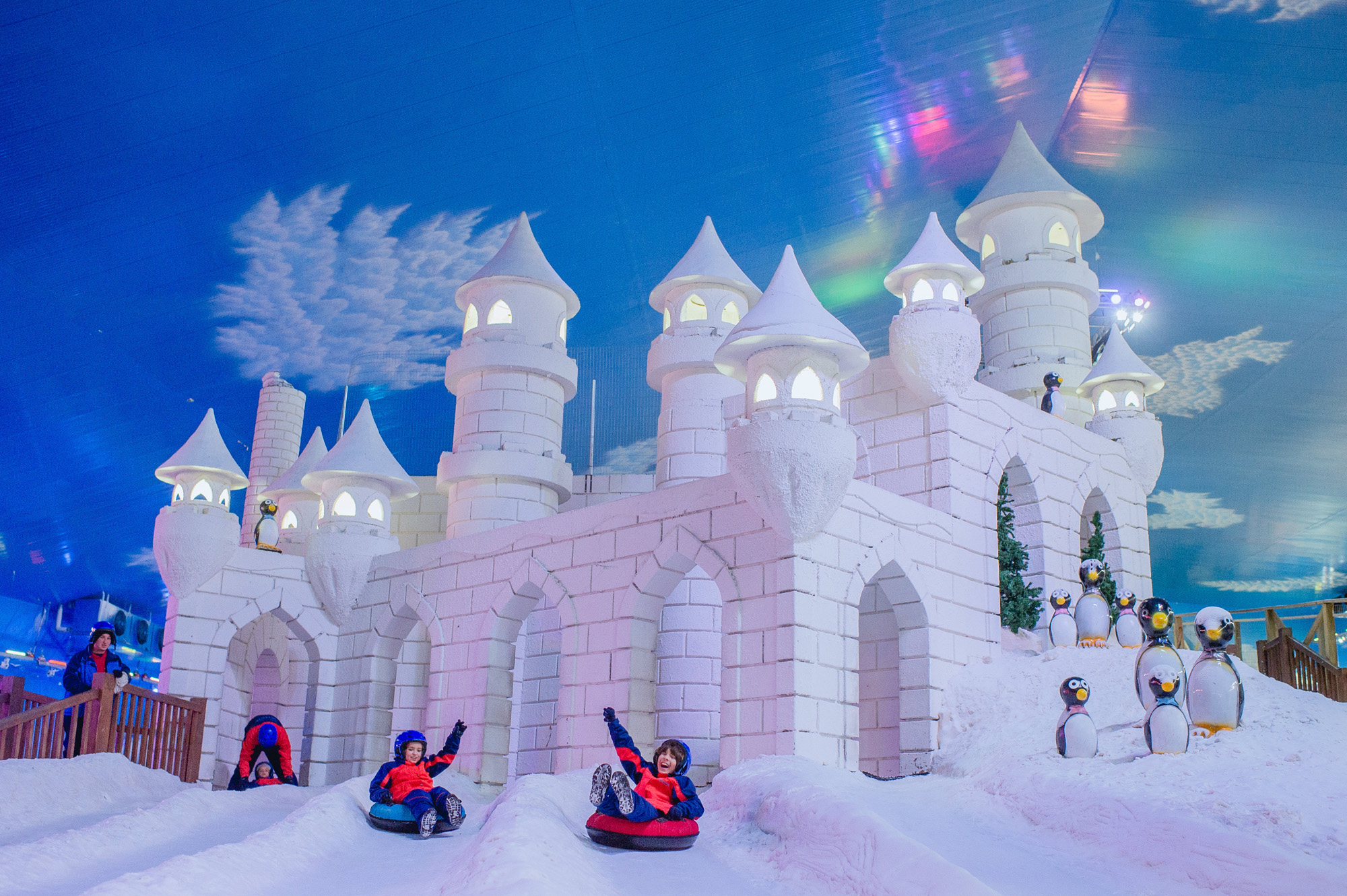 Viva a Neve!